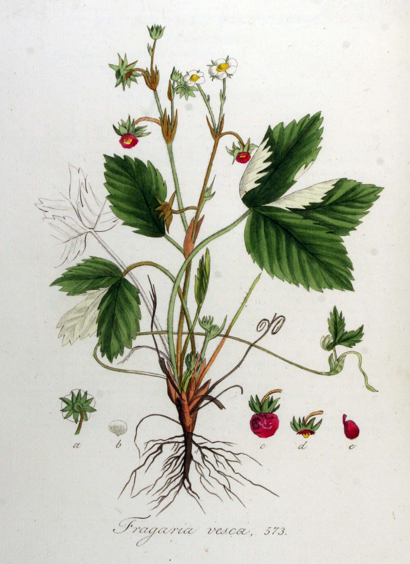 Fragaria vesca L.